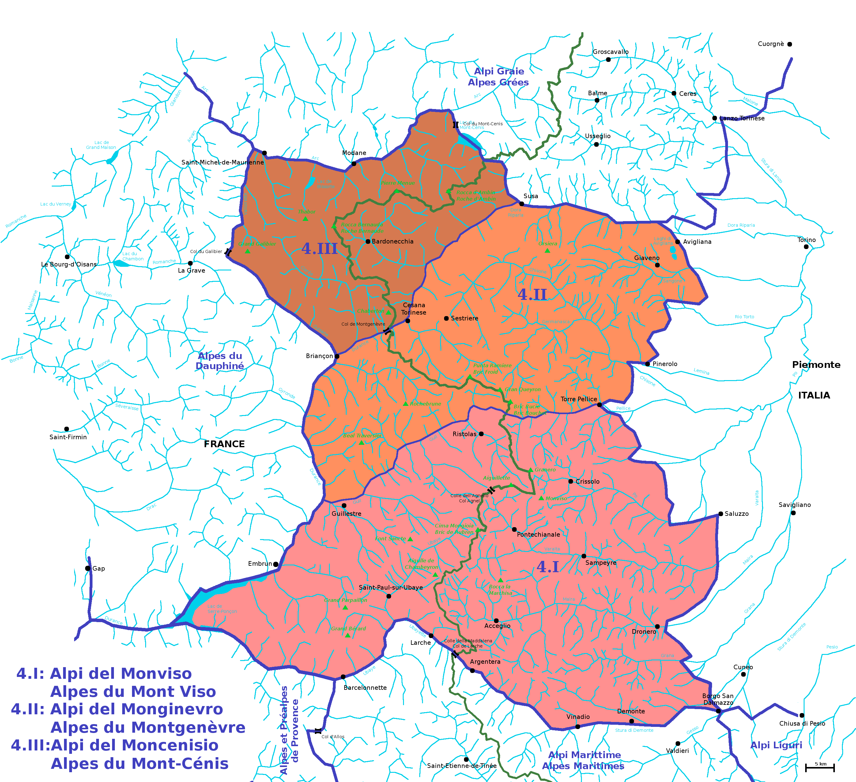 Carta schematica della sezione numero 4 delle Alpi secondo la SOIUSA (Alpi Cozie) con evidenziati: le sottosezioni, l'idrografia, i centri abitati principali, le vette principali.